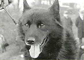 Собака каюра Гуннара Кассена - Балто